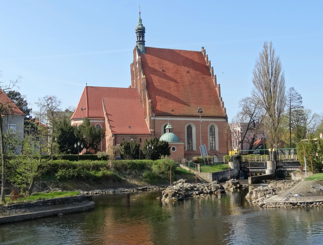 Katedra pw. św. Marcina i Mikołaja w Bydgoszczy, sanktuarium Matki Bożej Pięknej Miłości - widok od strony Brdy